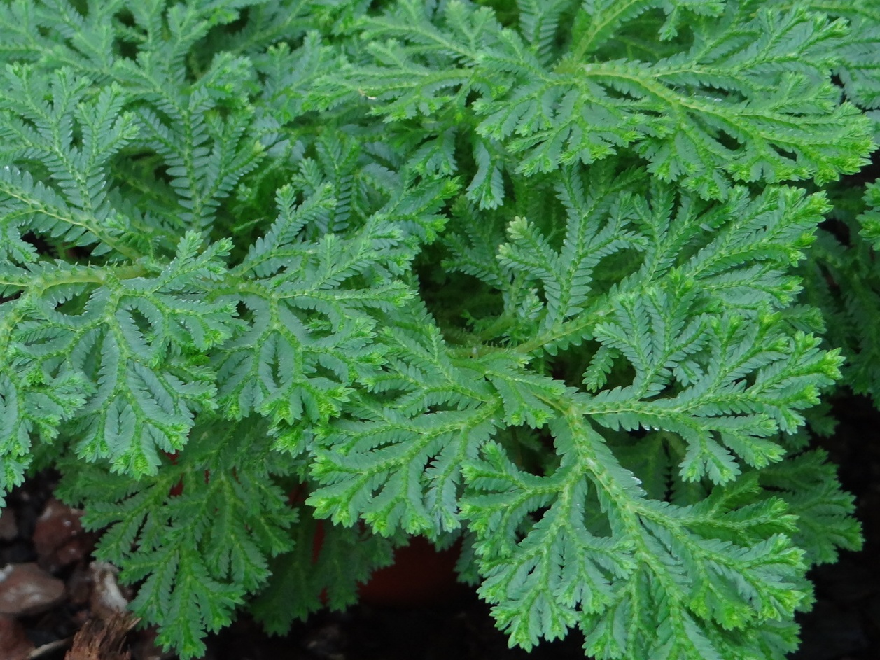 Selaginella martensii